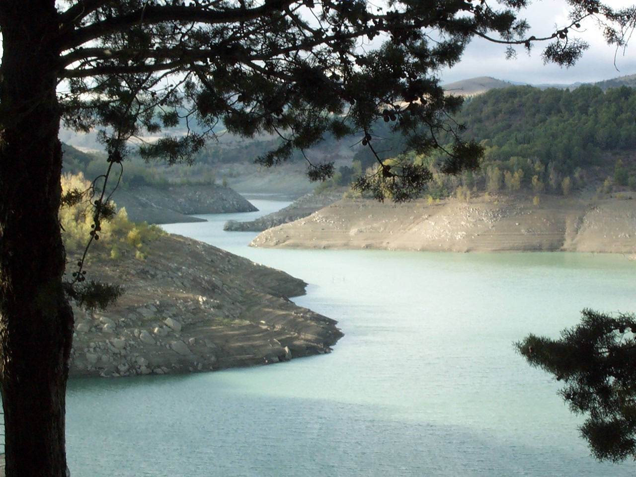 Lago Ancipa